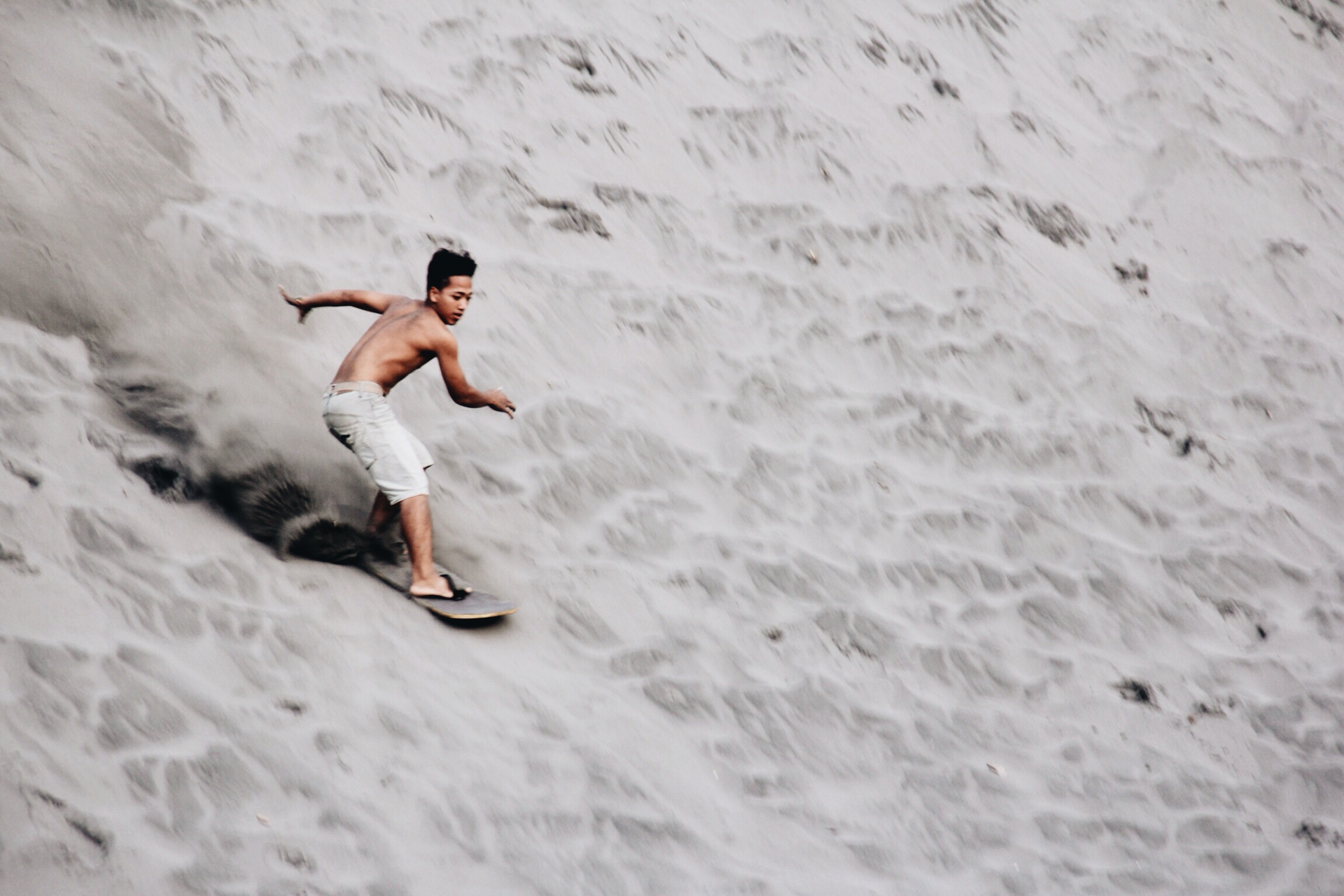 Gumuk pasir di bantul Yogyakarta merupakan padang pasir yang terbentuk secara alami dan sekarang terkenal untuk permainan sandboarding.Gumuk pasir ini tergolong wisata baru yang ada di kawasan bantul Yogyakarta,Gumuk pasir ini hanya ada 2 di indonesia pertama di Yogyakarta dan bromo.Obyek wisata ini wajib kita kunjungi ketika liburan di Yogyakarta karena kita bisa melihat padang pasir yang luas dan terbentuk secara alami yang jaraknya tidak jauh dari pantai. Gumuk pasir ini selain untuk sandboarding juga terkenal untuk kegiatan foto prawedding ,sudah banyak orang yang menggunakan gumuk pasir ini buat foto praweding lhooo,hehehehe.Anda bisa berfoto di sini dengan menyewa kuda seperti foto di luar negeri.Bagi anda yang suka bermain selancar coba lah sensasi baru selancar di gumuk pasir.Untuk datang ke gumuk pasir ini lebih baik ketika menjelang sore atau jam 3 an ,karena selain tidak terlalu panas anda bisa beruntung melihat matahari terbenam di gumuk pasir